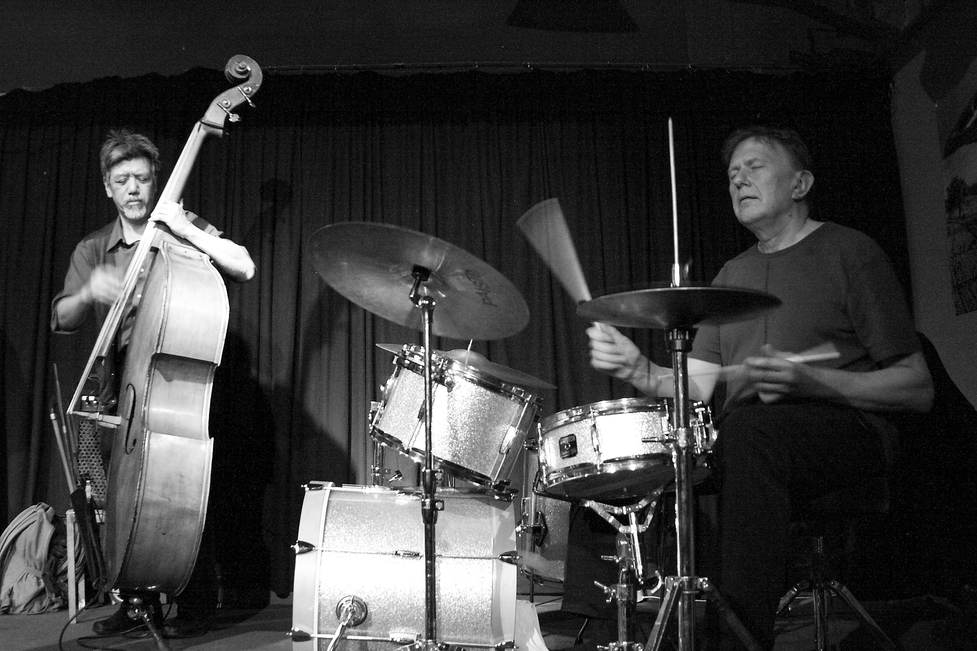 Konzert mit Boom Box (Akira Ando, Thomas Borgmann und Willi Kellers) im Club W71